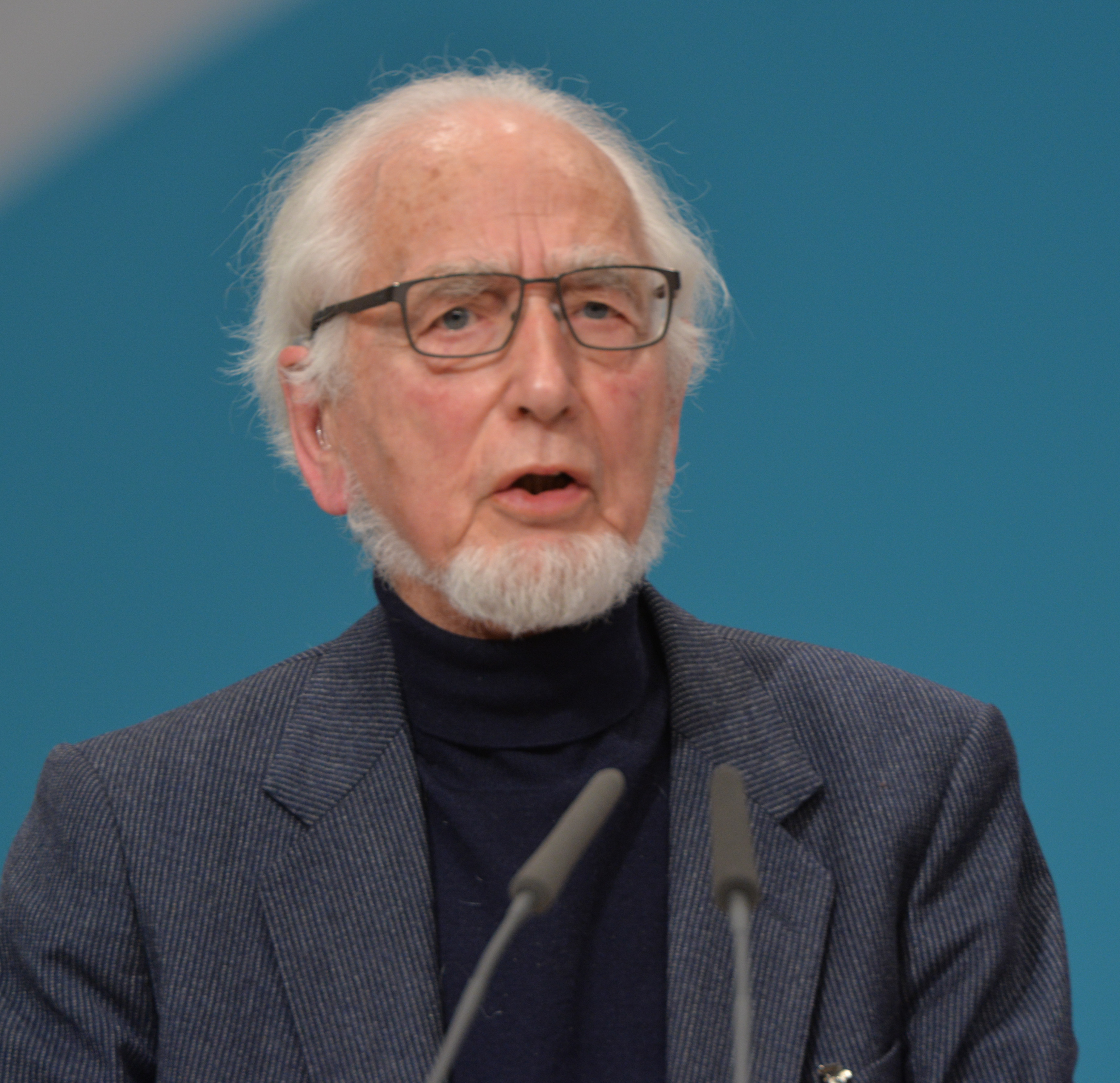 Erhard Eppler SPD Bundesparteitag